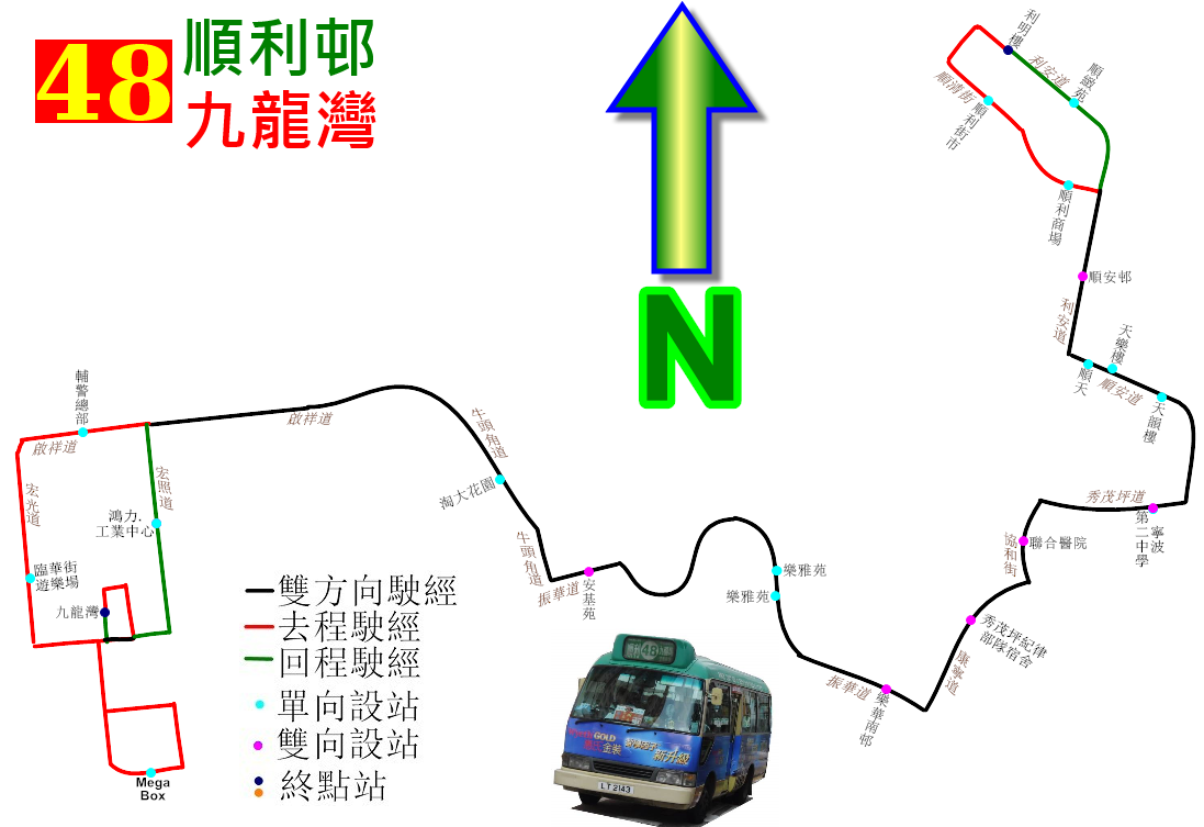 中文（香港）: 九龍專線小巴48線的走線圖